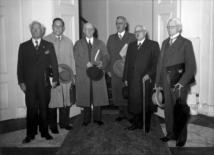 Vijfde kabinet (ministerie) Colijn. V.l.n.r: Damme, Schrieke, Bodenhausen, v.d. Bussche, Van Lith de Jeude en Van Dijk. Den Haag, 24 juli 1939.